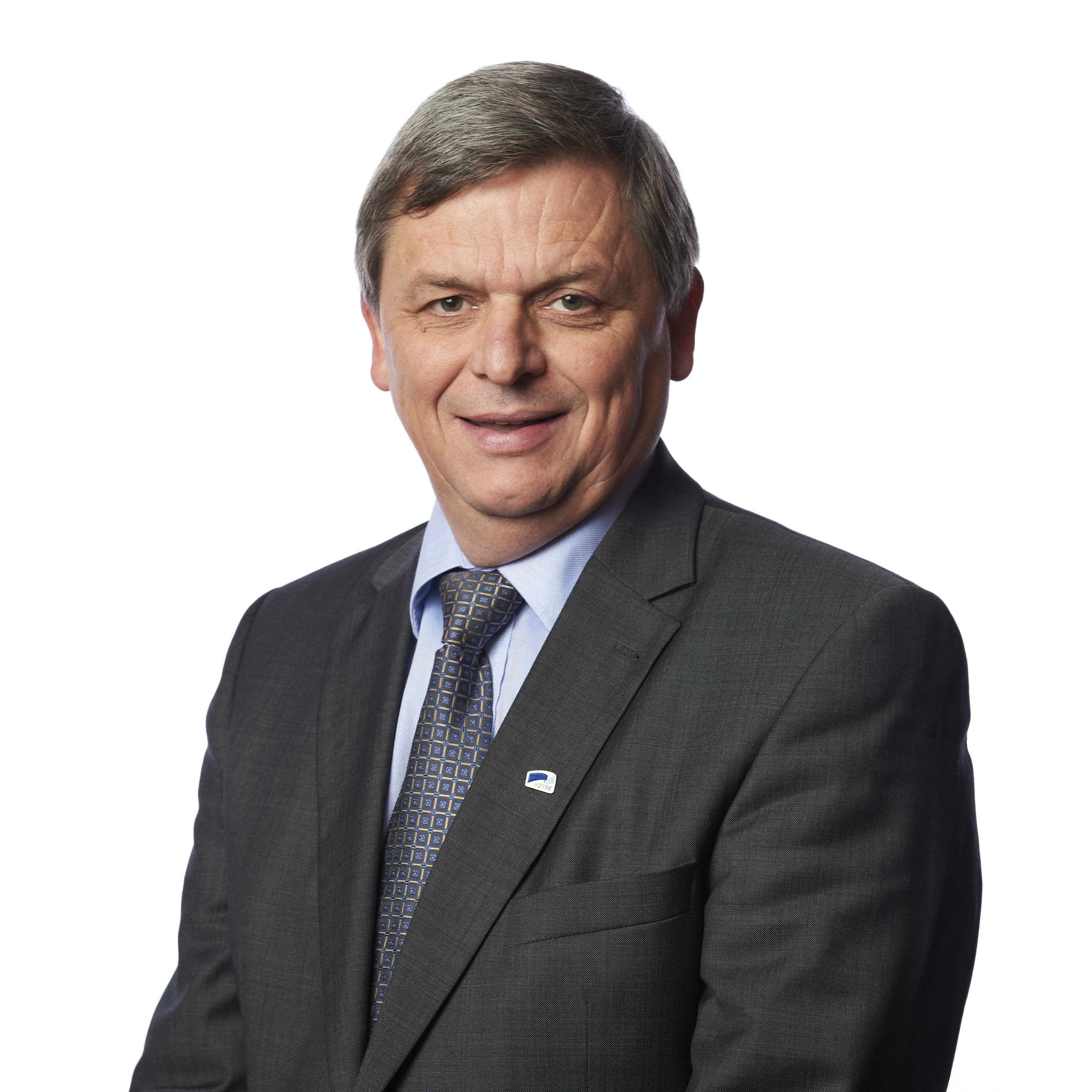 Inge Reidar Kallevåg, Høgre, fylkesutvalet